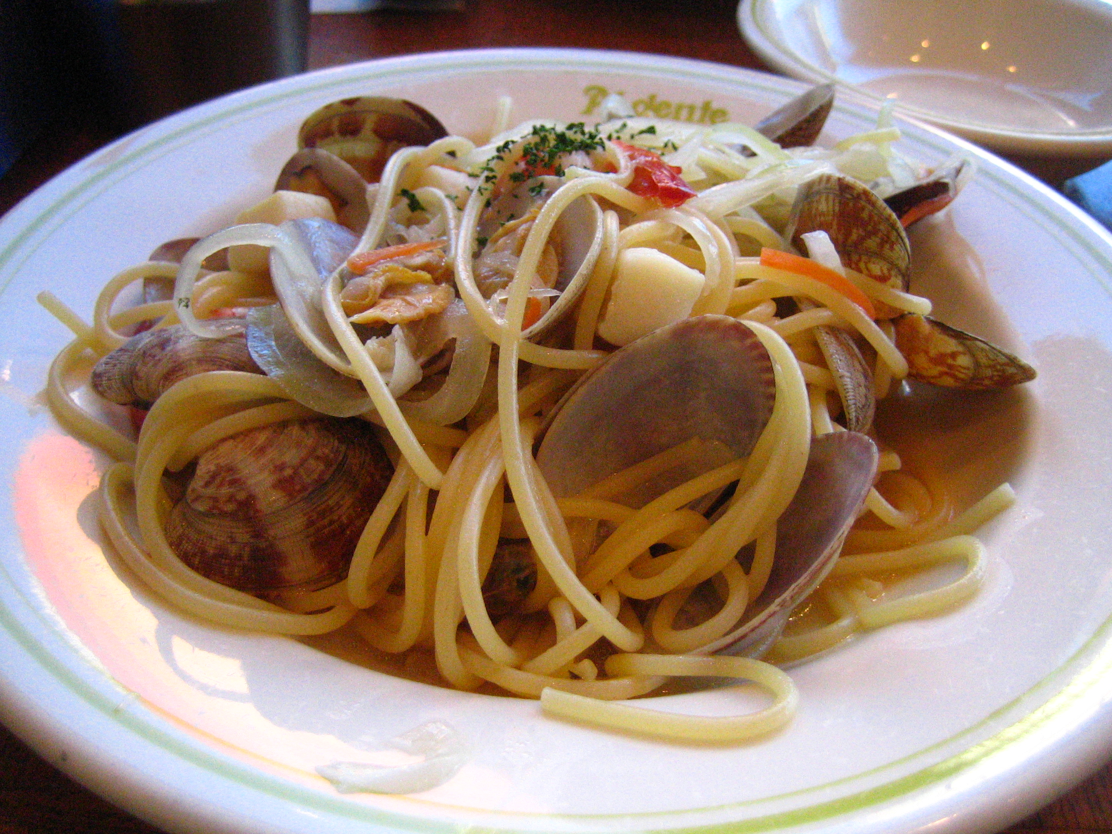 at Aruden-tei, in GInza, Tokyo.ボンゴレ